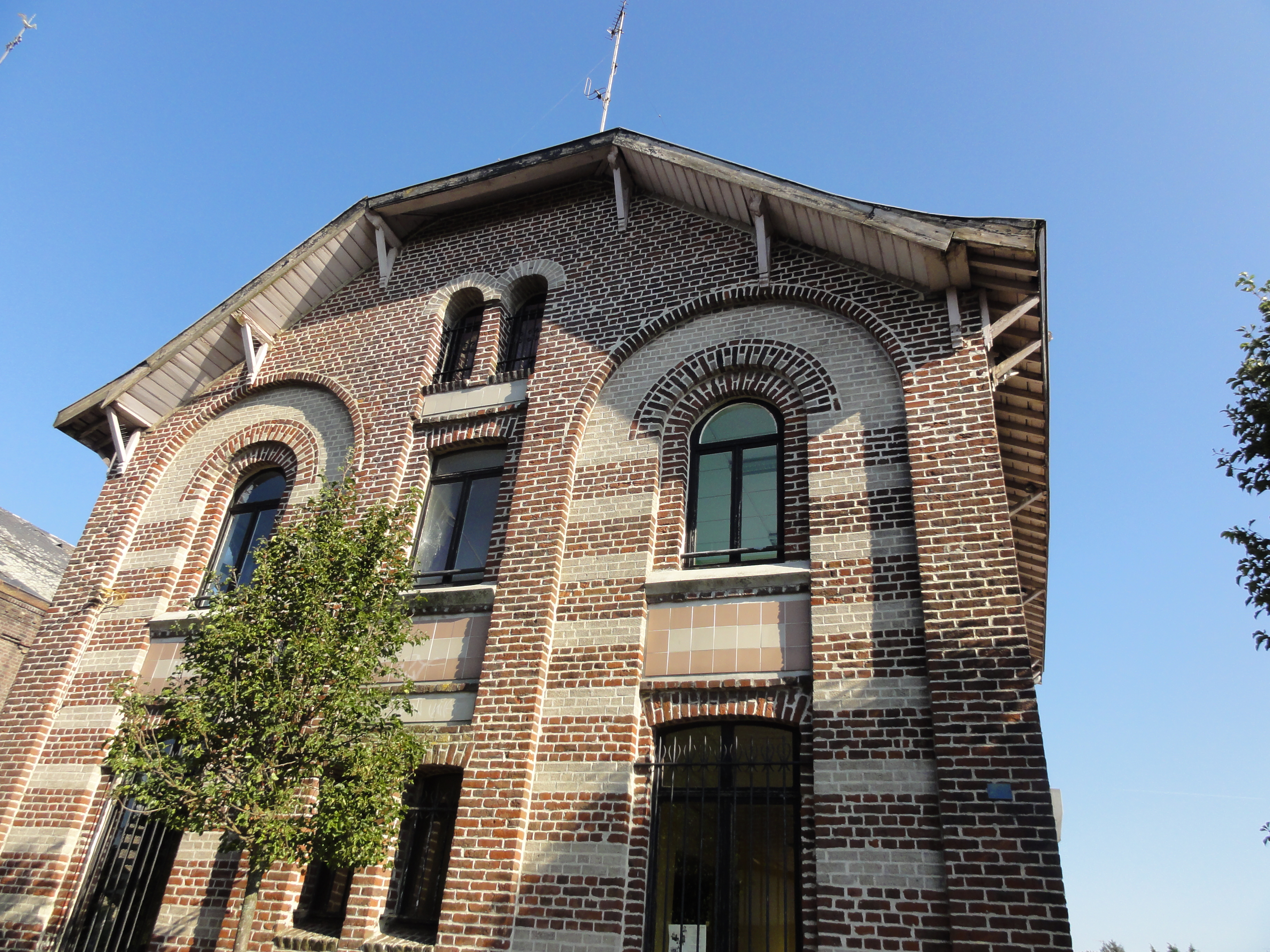 Écoles des cités de la Fosse Thiers de la Compagnie des mines d'Anzin à Bruay-sur-l'Escaut et Escautpont, Nord, Nord-Pas-de-Calais, France.